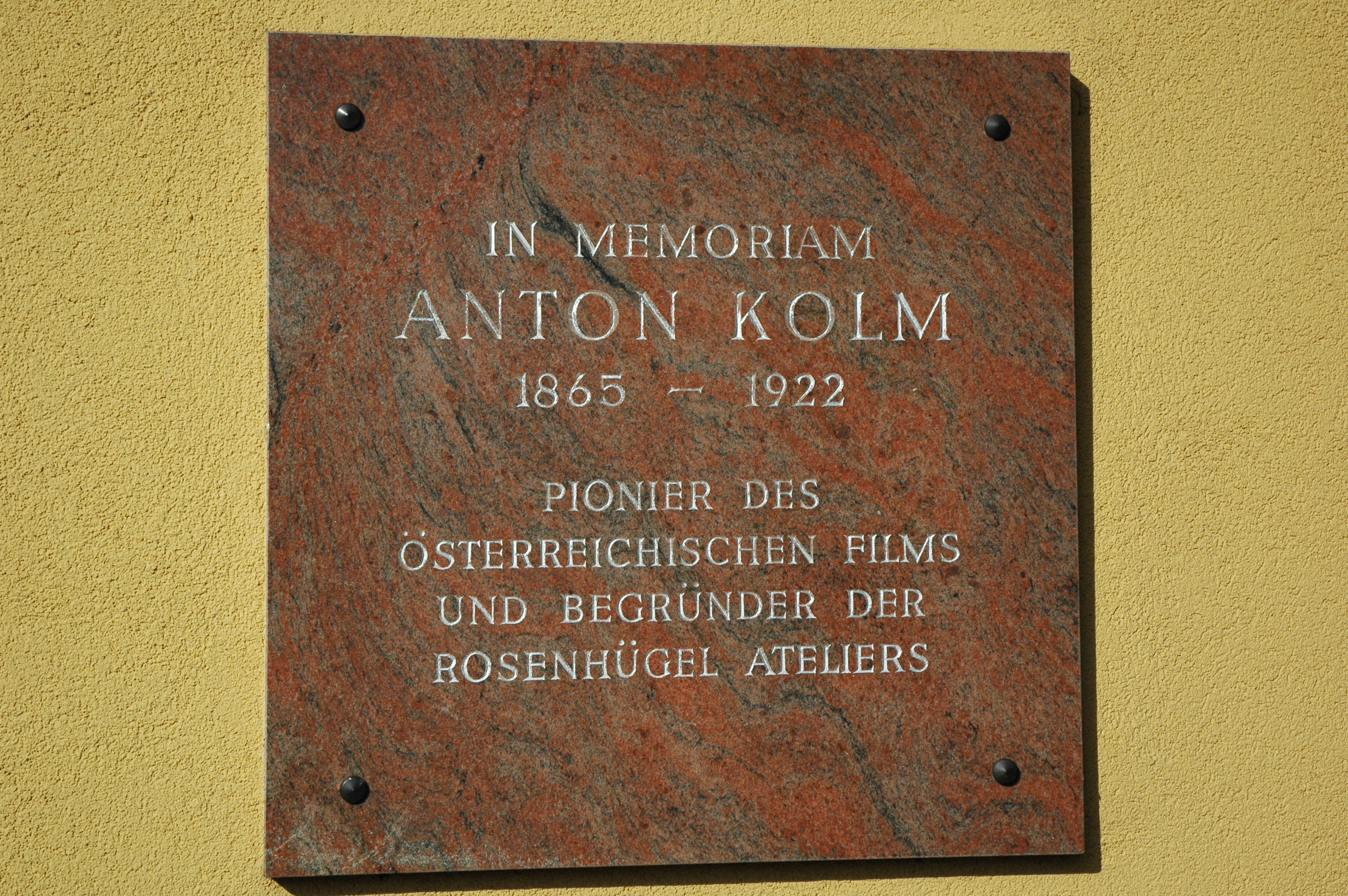 Gedenktafel an den Gründer der Rosenhügel Filmstudios (Vita Film Ateliers) Anton Kolm; angebracht an der Einfahrt eben dieser Studios.